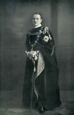 Prinz Firedrich Leoplod (Sohn) in der Robe des Schwarzen Adlerordens, ca. 1914